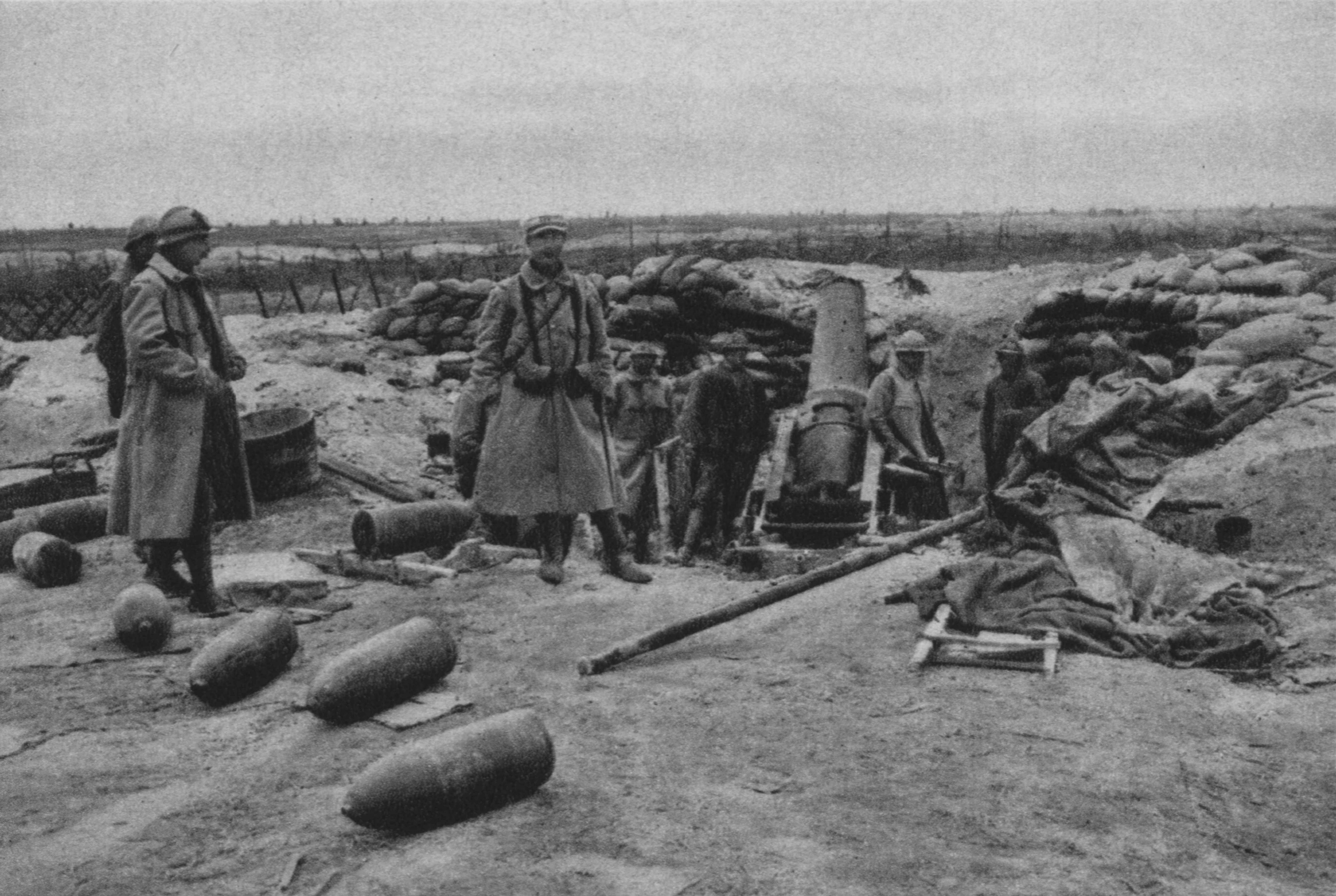 Französische Mörserstellung zwischen Souain und Navarin während der Herbstschlacht in der Champagne (6. Oktober 1915).